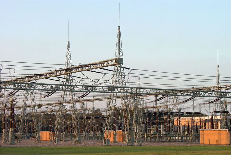 380-kV-Umspannwerk Hamburg-Nord in Norderstedt (Stadtteil Friedrichsgabe, nahe Quickborn). Die Anlage wird seit 2010 von 50Hertz Transmission betrieben.